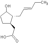 Химическая формула жирной карболовой кислоты